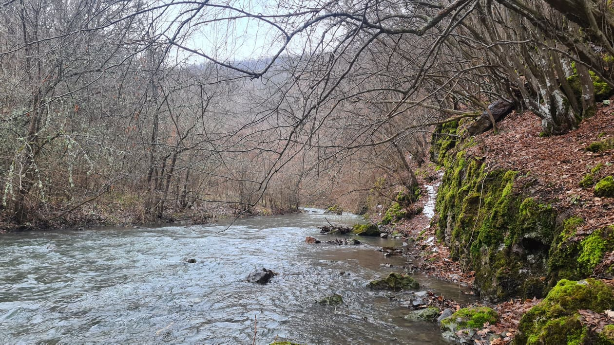 view from the river